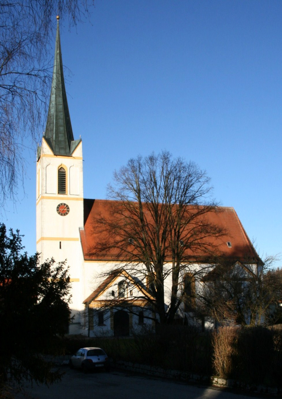 Die katholische Pfarrkirche Mariä Himmelfahrt in Reichertsheim (Landkreis Mühldorf am Inn, Oberbayern). Ein spätmittelalterliches Bauwerk, das in den 1780ern in barocker Manier umgestaltet und neu dekoriert wurde. Der Turm steht auf der Vorderseite, das Langhaus ist einschiffig, der Chor polygonal. Haupteinrichtung im barocken Stil: Hochaltar, Kanzel und Orgelempore. Der Innenraum zeigt reichen und bewegten Stuckdekor in ländlicher Rokoko-Art.